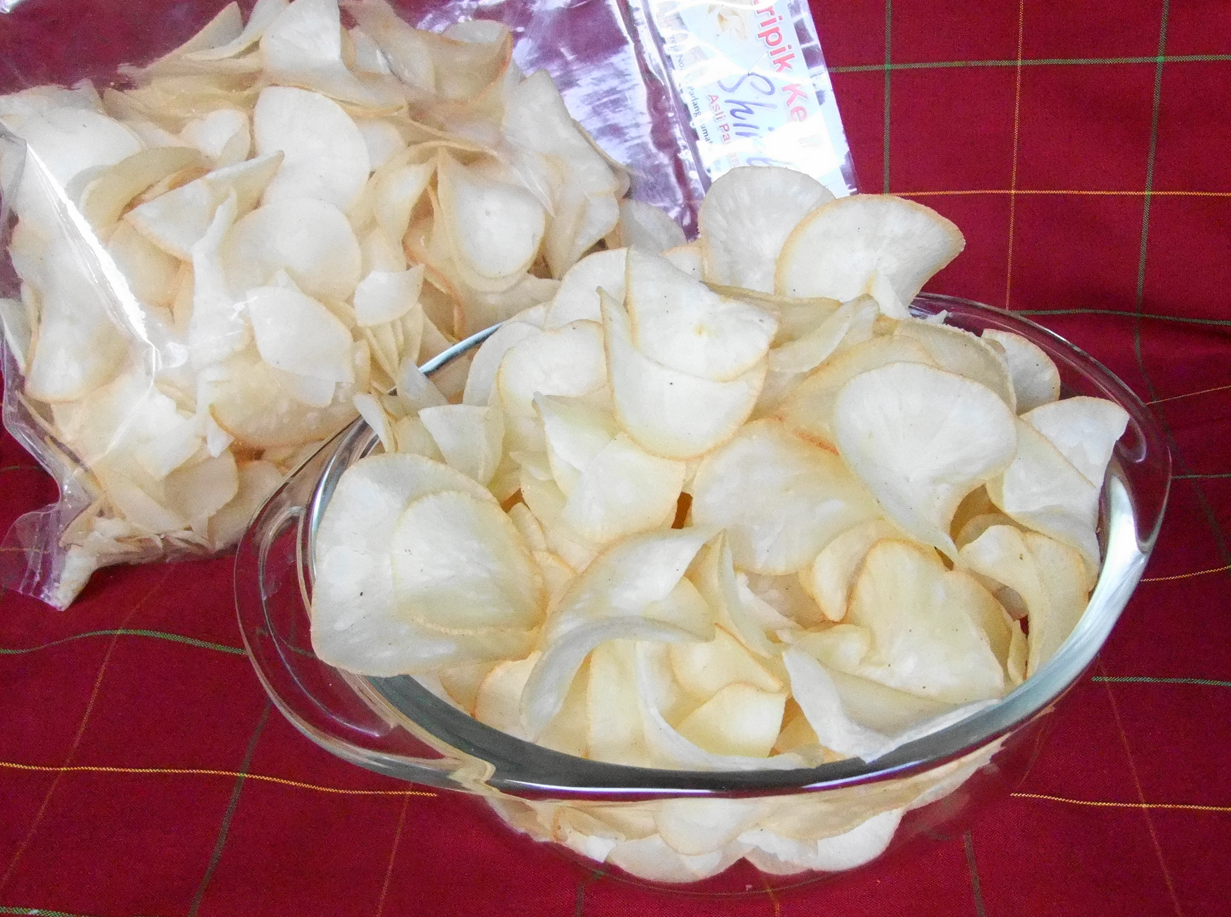 Keripik sanjay